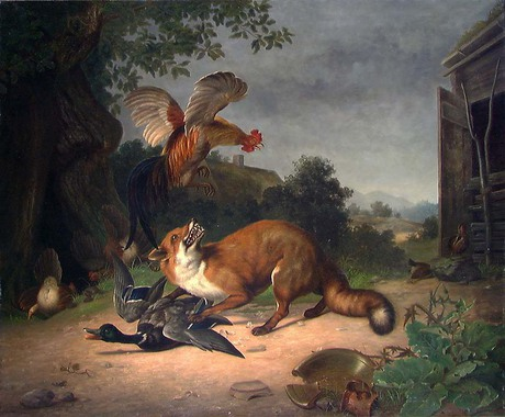 Norwegian: Reven i hønsegården.Fox in the Poultry Yard.title QS:P1476,no:"Reven i hønsegården." label QS:Lno,"Reven i hønsegården." label QS:Len,"Fox in the Poultry Yard."